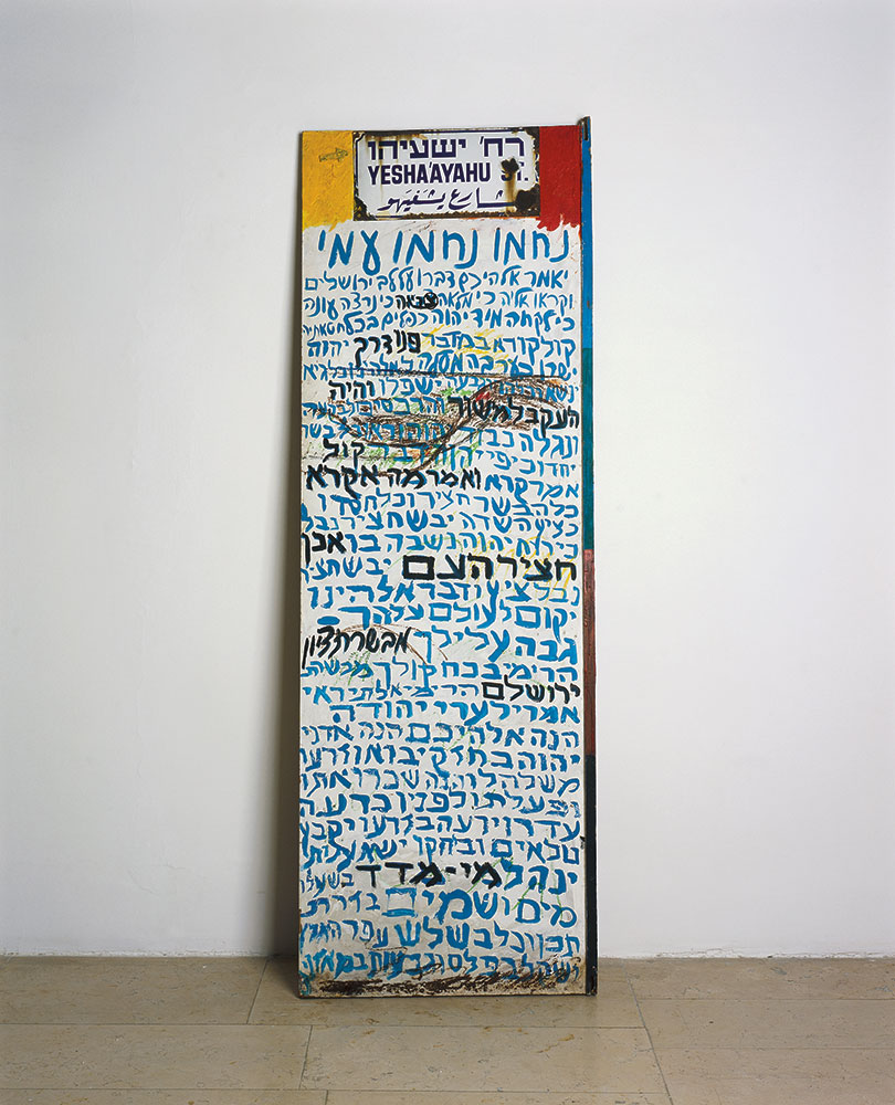 נחמו נחמו עמי (1978), אקריליק ועפרונות שמן על לוח עץ ושלט רחוב, 62x183 ס״מ